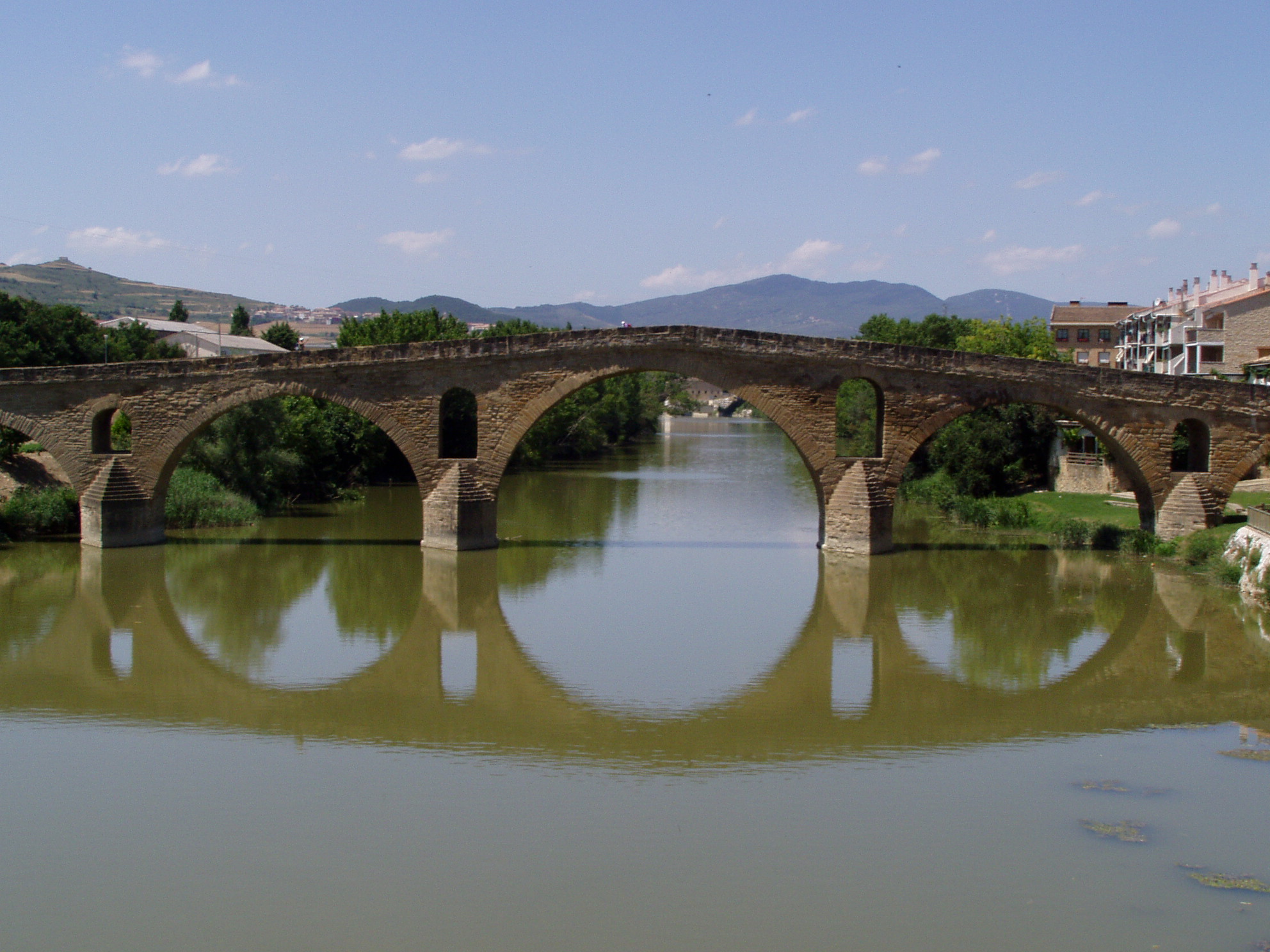 Le pont des pèlerins à Puente la Reina (Espagne) où passe le chemin de Saint-Jacques-de Compostelle